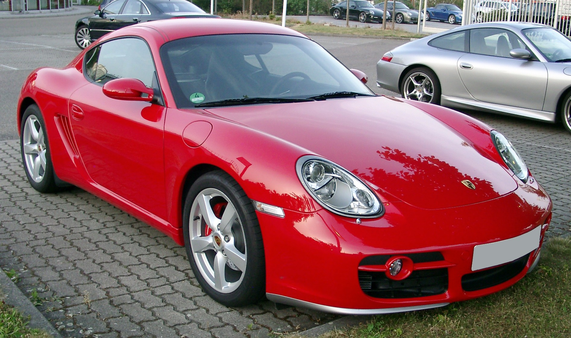 Porsche Cayman S